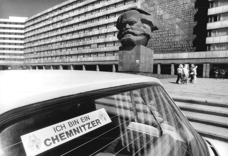 Chemnitz, Befragung zu altem Namen ADN-Thieme 10.4.90-Karl-Marx-Stadt: Bürgerbefragung - 234.000 Stimmkarten werden gegenwäritg an alle Bürger, die ihren Hauptwohnsitz in Karl-Marx-Stadt haben und 1990 das 18. Lebensjahr vollenden, verschickt. Mit einem Kreuz kann man sich auf der Karte für den bisherigen Namen der Stadt oder ihren ehemaligen - Chemnitz - entscheiden. Die öffentliche Auszählung erfolgt am 23.4.1990. Dieser Kraftfahrer, der seinen Wagen vor dem Marx-Monument parkt, hat sich offensichtlich schon entschieden.